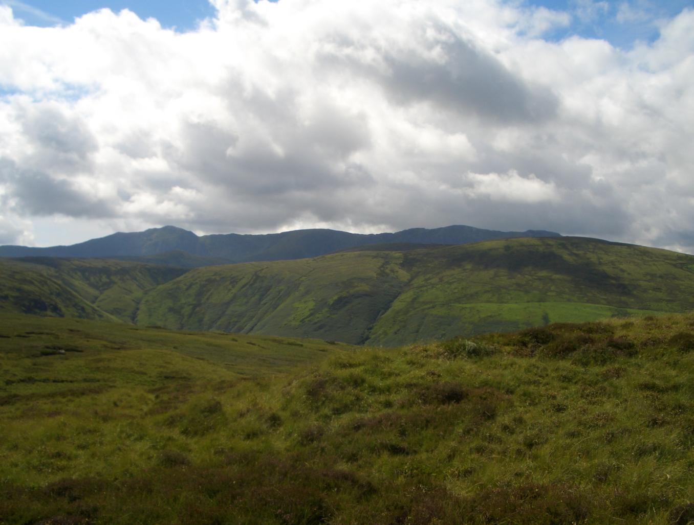 FOEL RHUDD